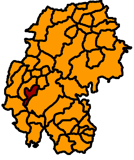 Elgersburg hervorgehoben, Ilm-Kreis